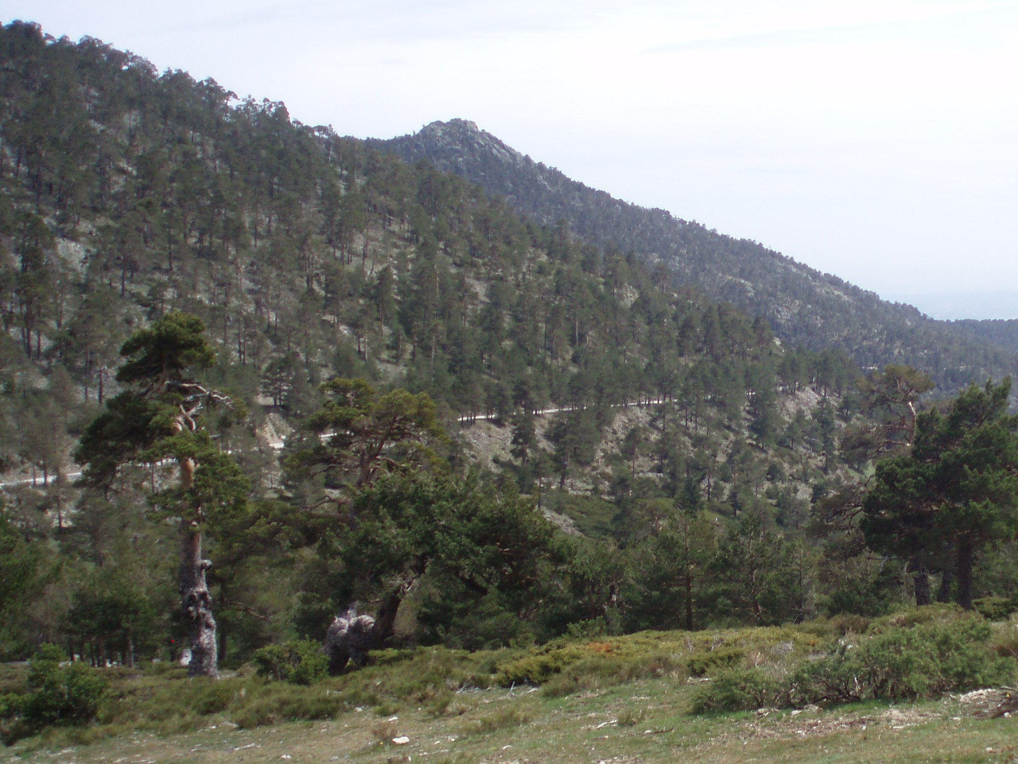 Carretera de la República del valle de la Fuenfría (Sierra de Guadarrama, España).